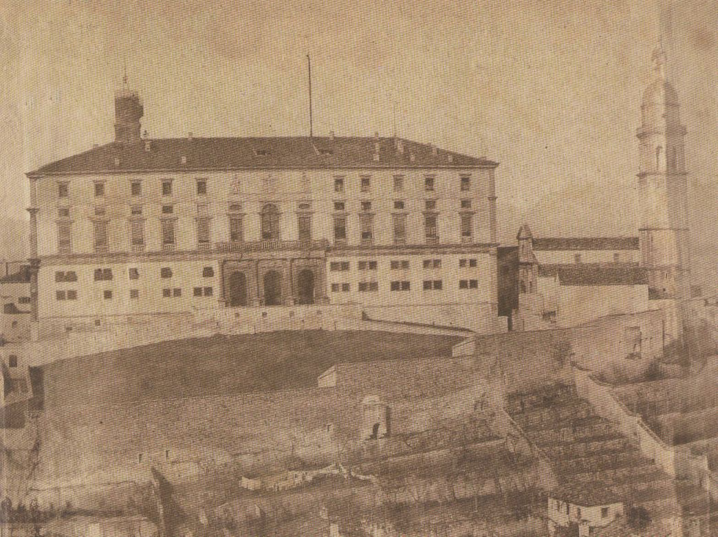 Udine-veduta del castello (foto di Bonaldi del 1860)